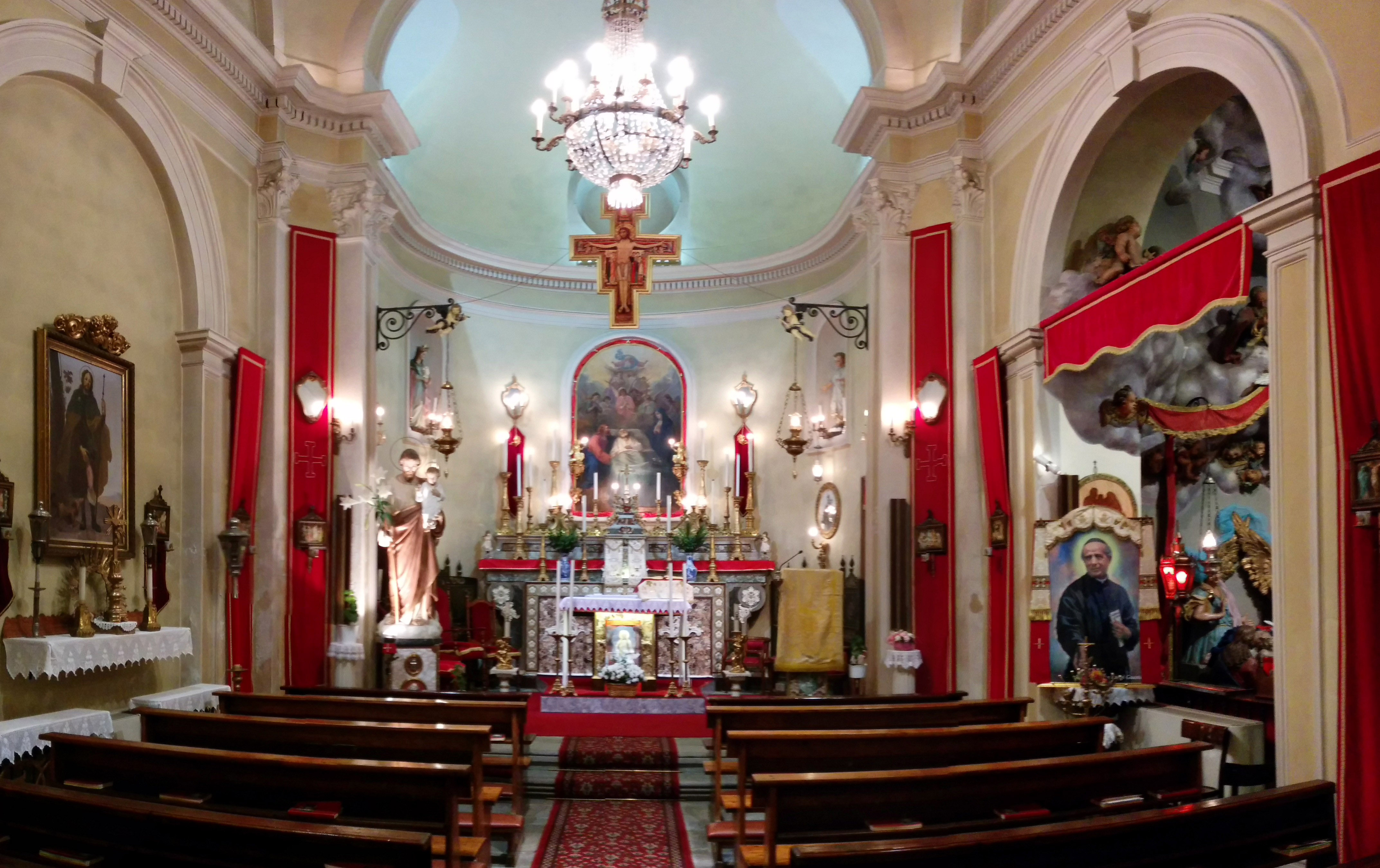 La Navata della Chiesa di San Giuseppe di Biella - Riva